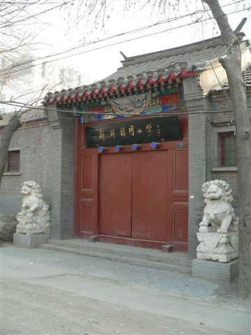 新鲜胡同小学 拍摄